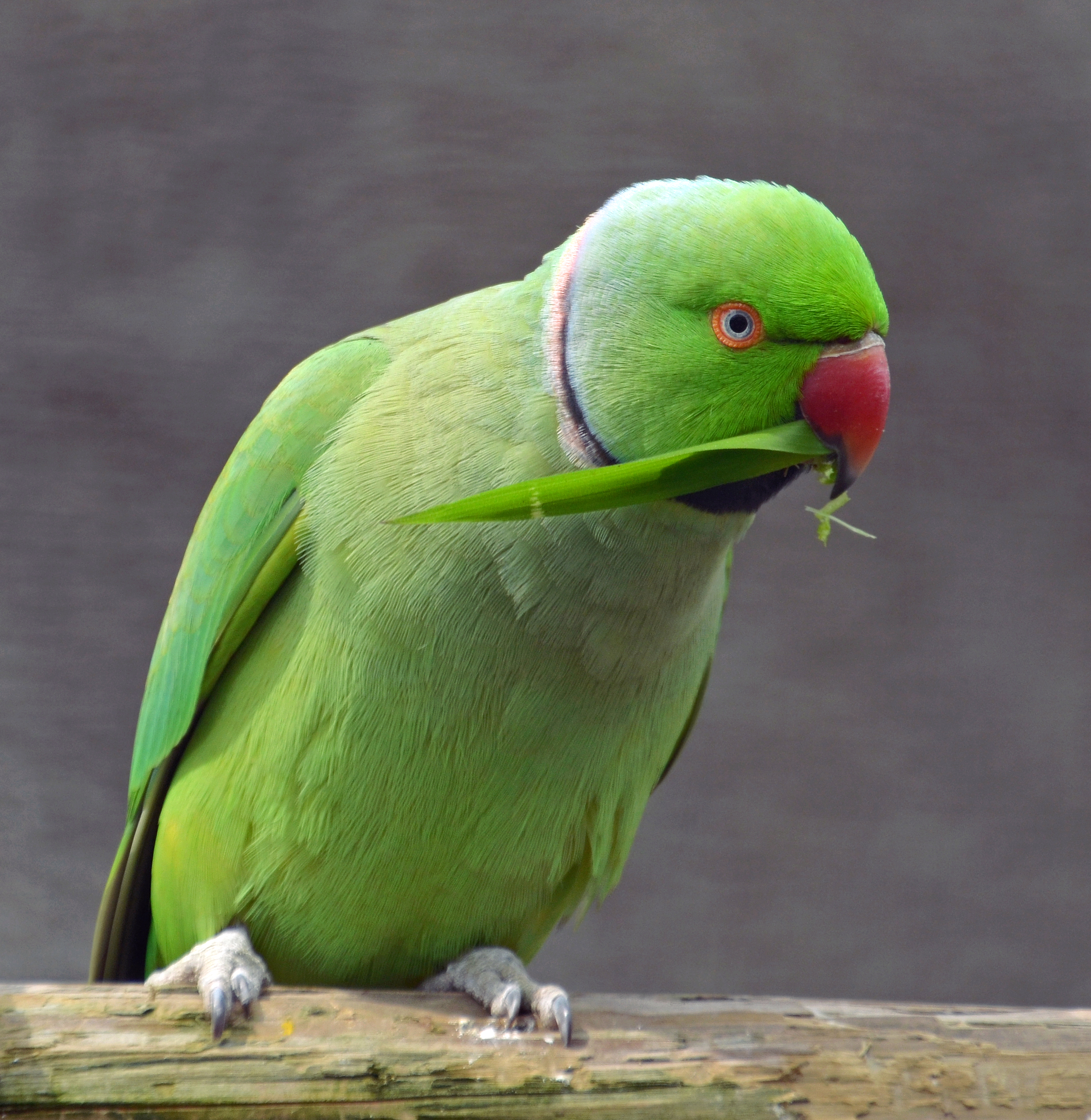 Perruche à collier (Psittacula krameri)